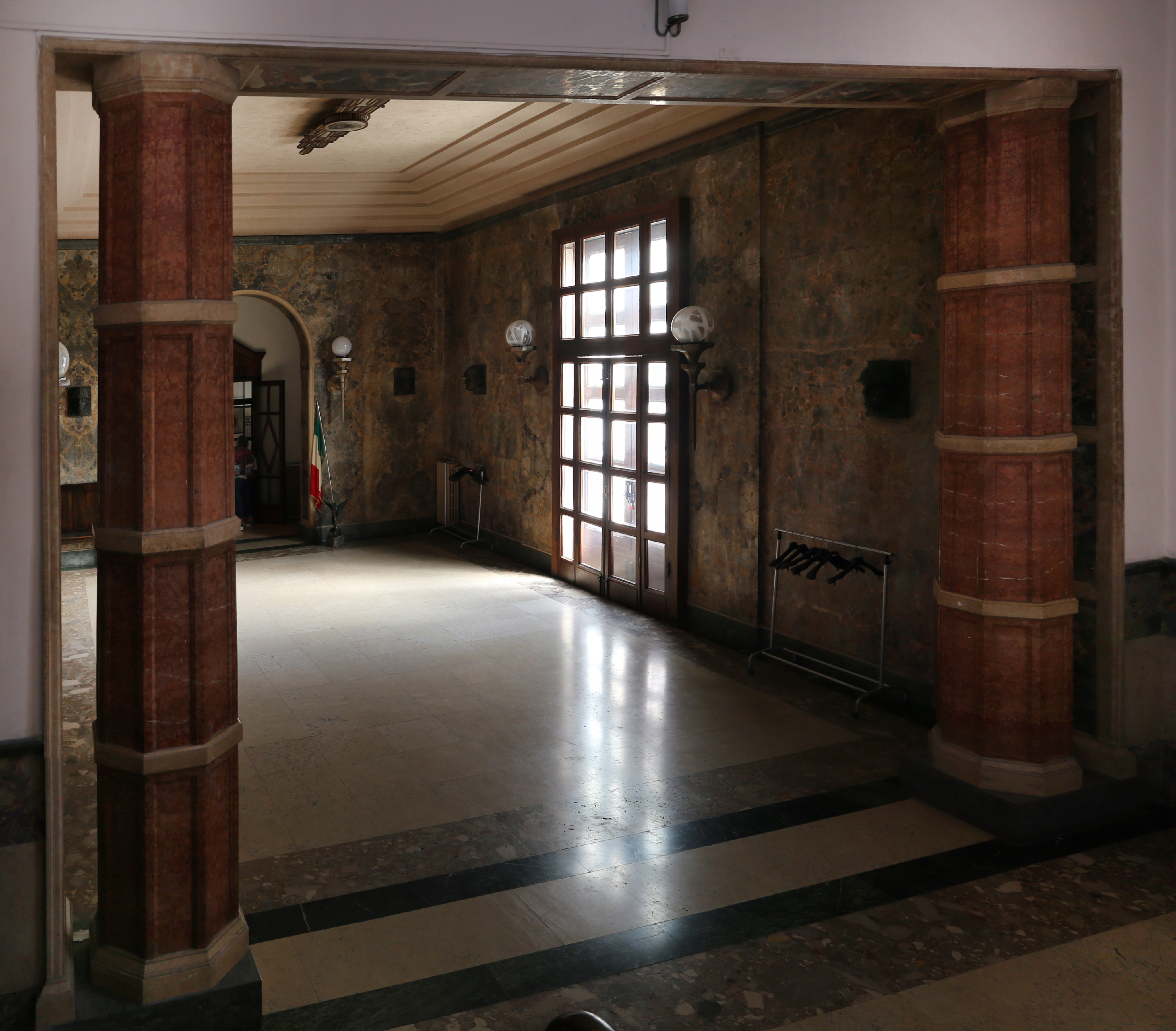 Casa del Mutilato This is a photo of a monument which is part of cultural heritage of Italy.